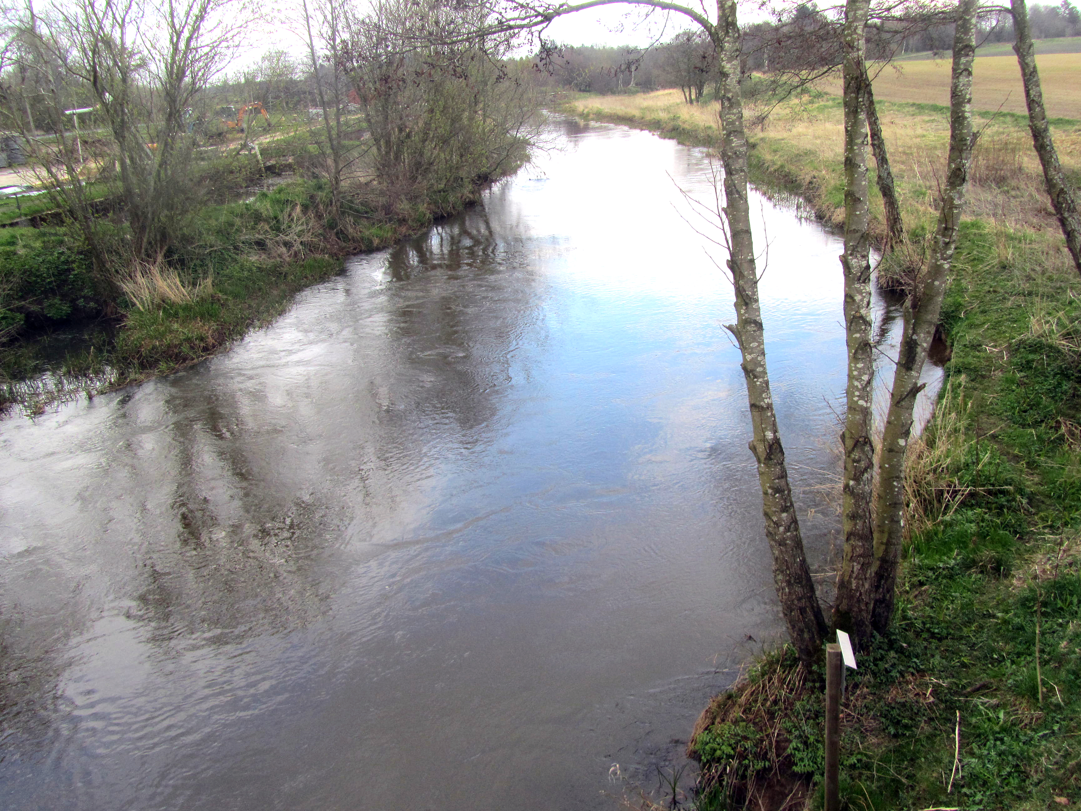 Skjern Å ved Skarrild set mod øst